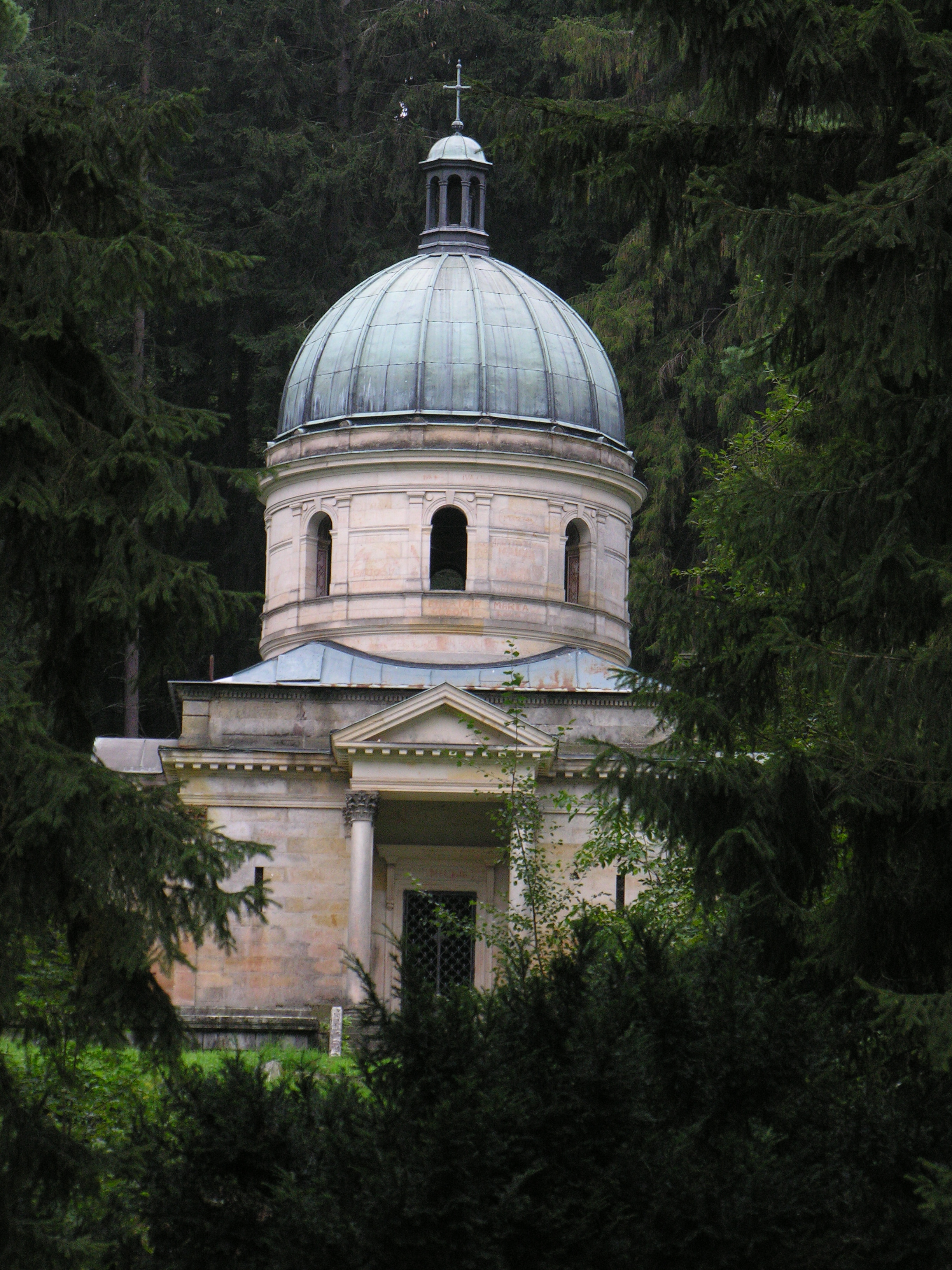 Sobotin. Grobowiec Kleinów